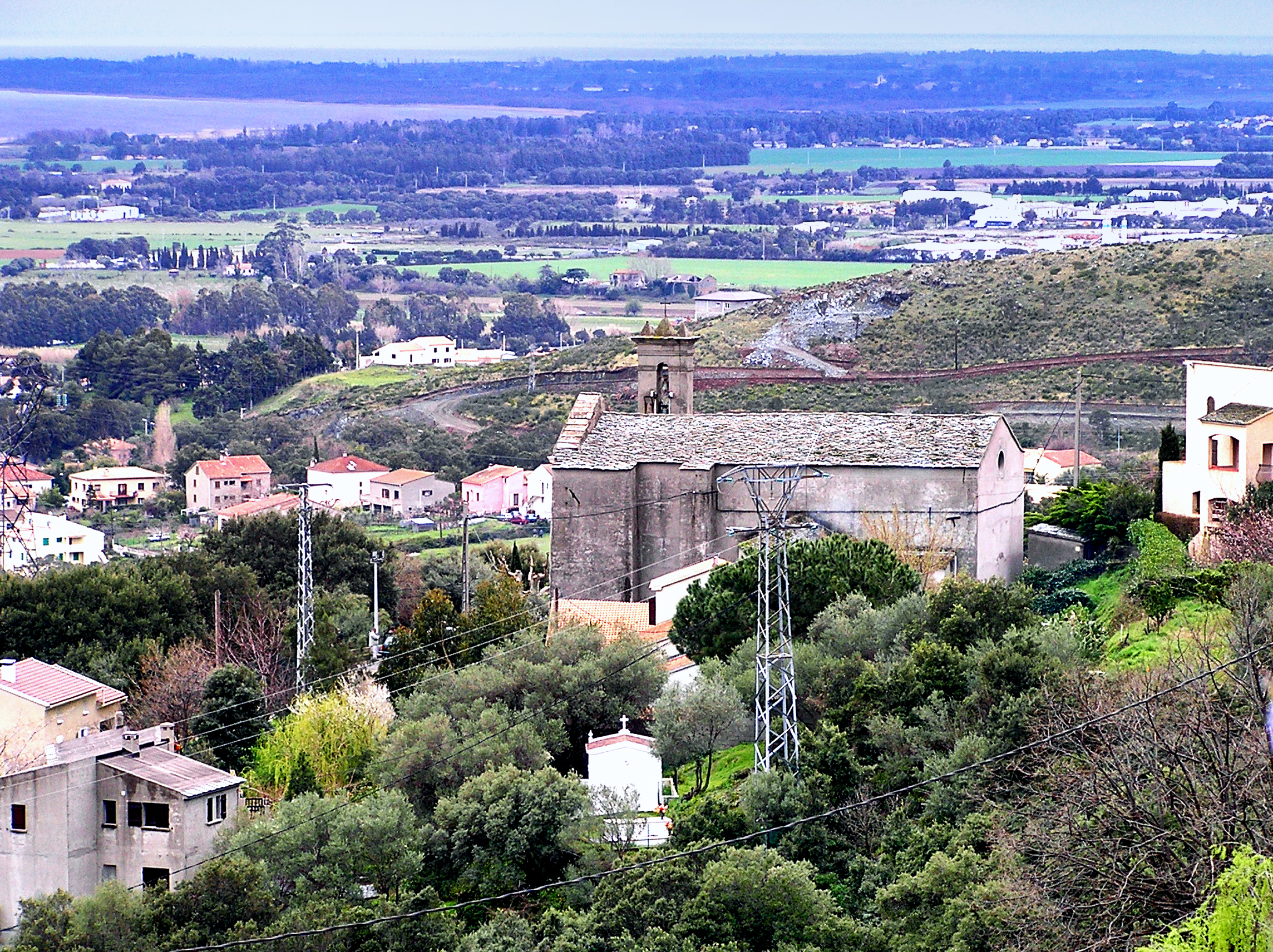 Biguglia, agglomération bastiaise (Haute-Corse) - L'église paroissiale Saint-André du XVIIe siècle, est située sous le village.